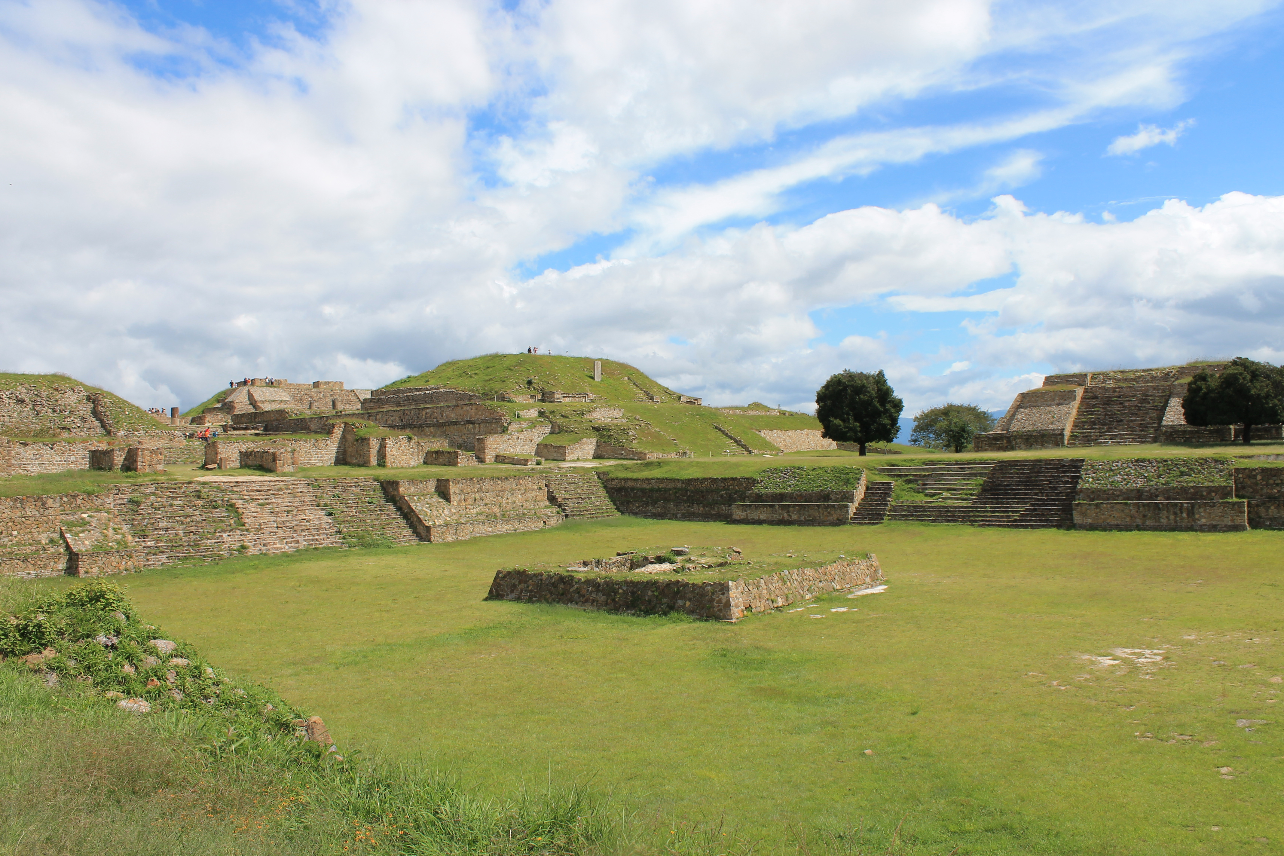 Se muestra el patio hundido desde la esquina ubicada junto al Edificio B. De Izquierda a derecha, en el fondo, se aprecian los edificios I, D, E y A.